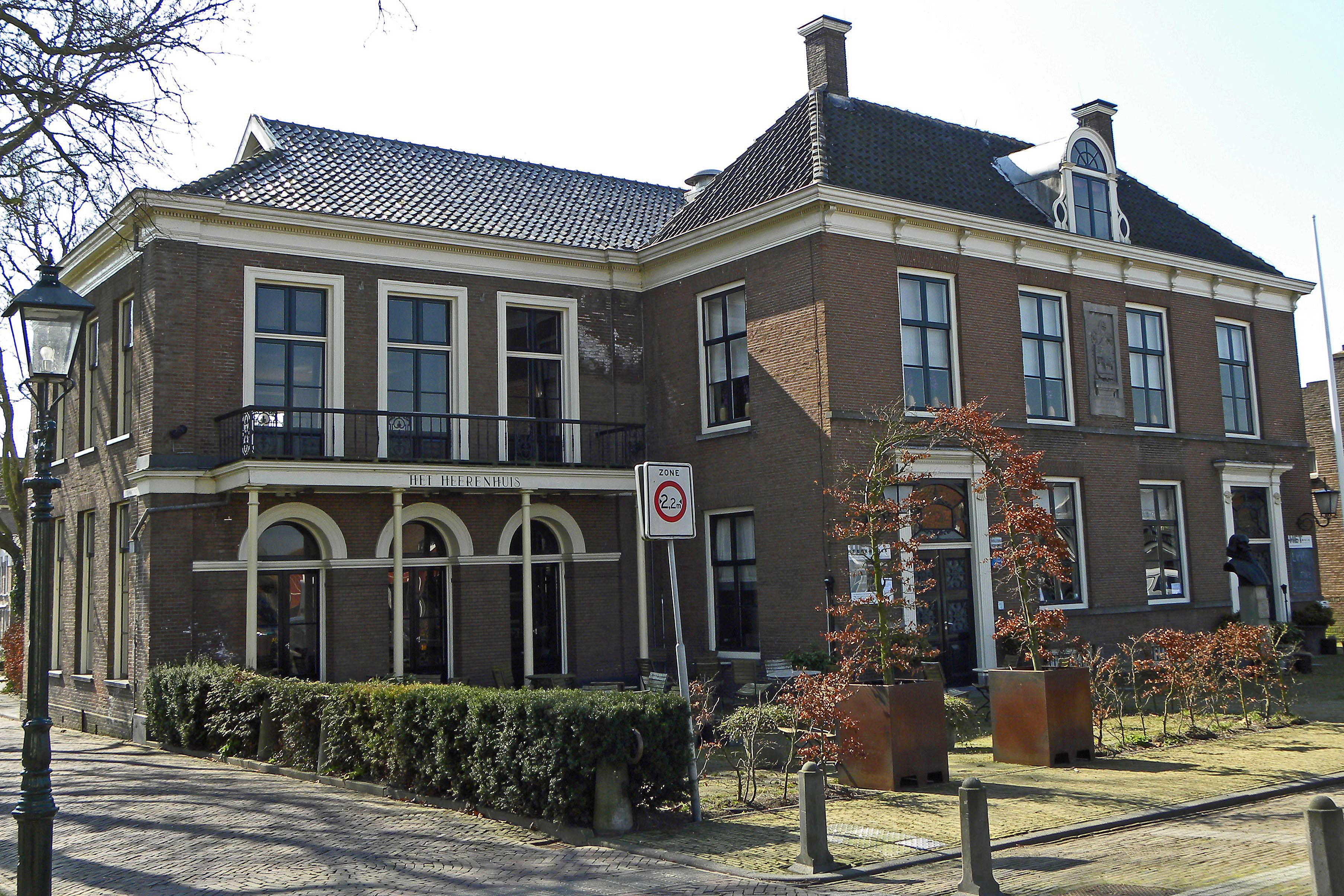 Horeca "Het Herenhuis"